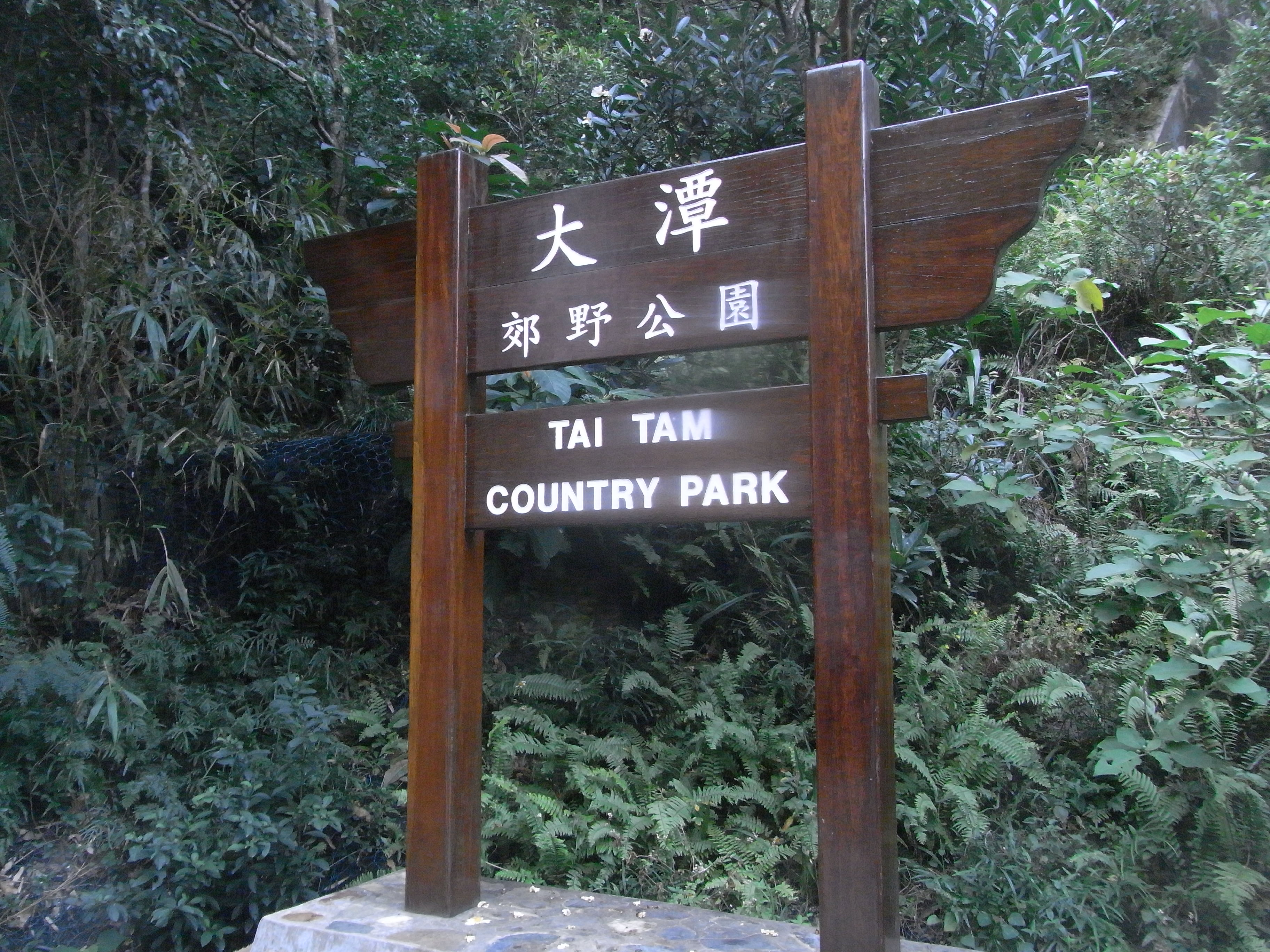 中文（香港）: 香港島 大潭郊野公園